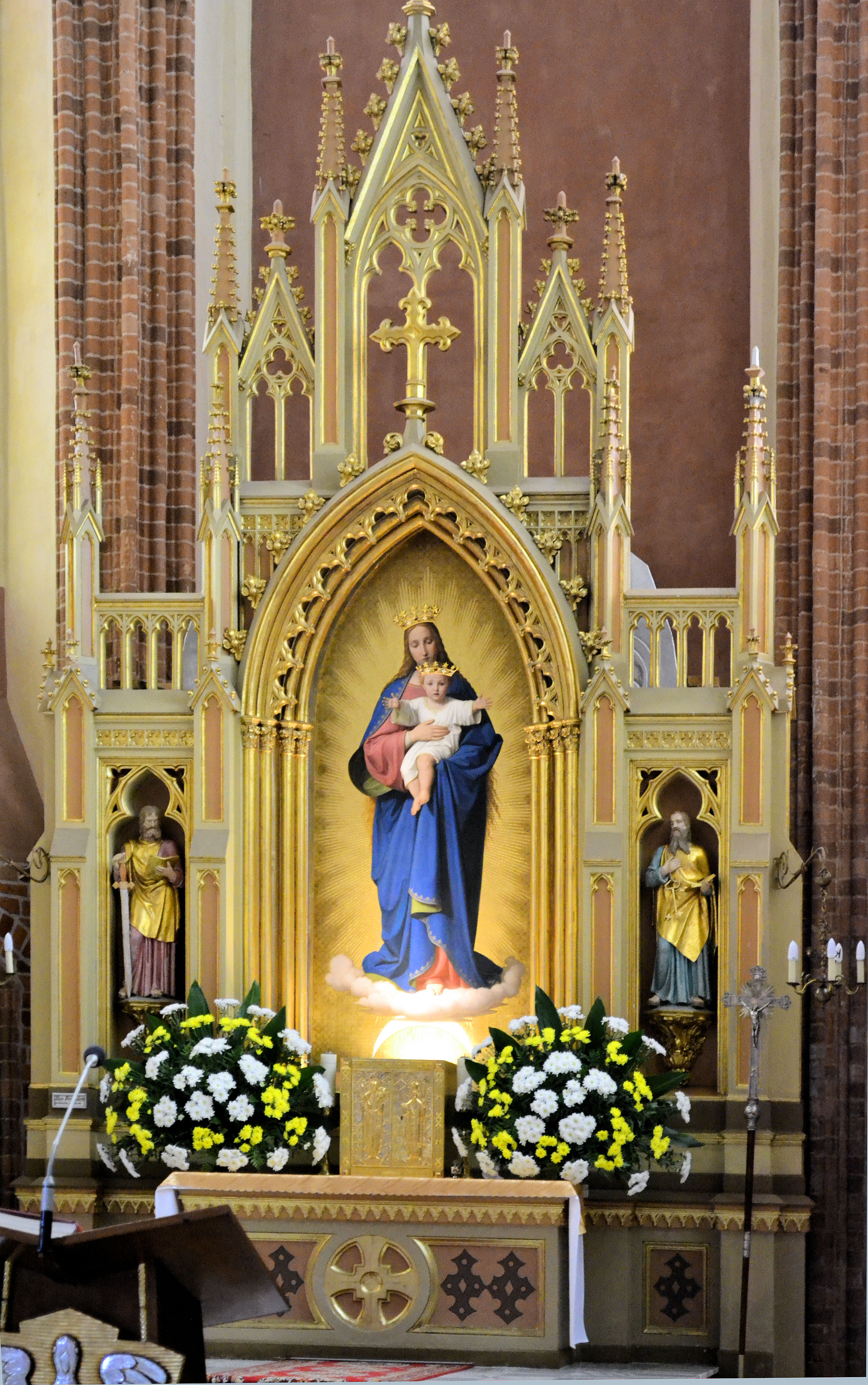 kościół Macierzyństwa NMP Trzebiatów